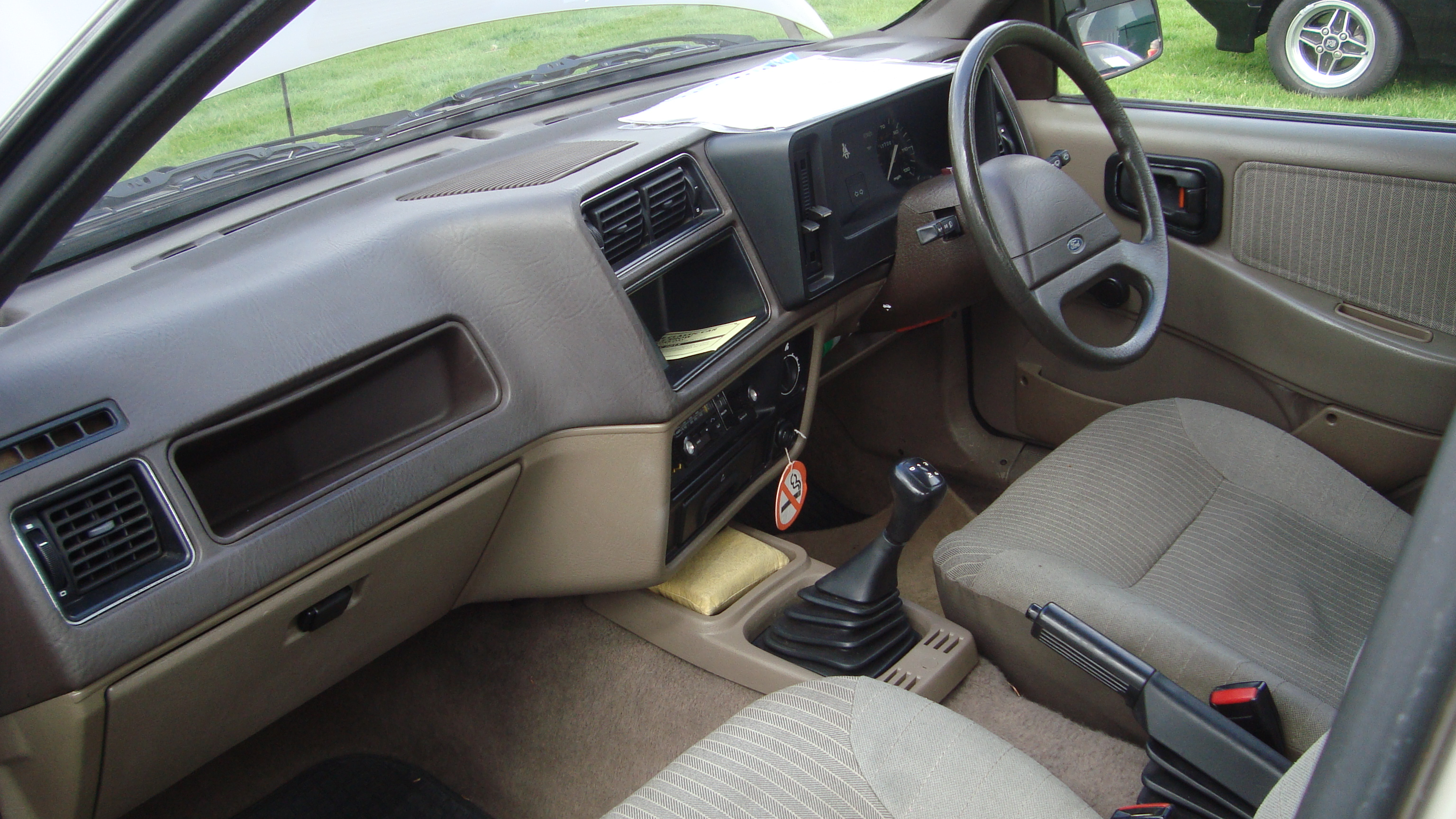 1983 Ford Sierra 1.6 L Interior